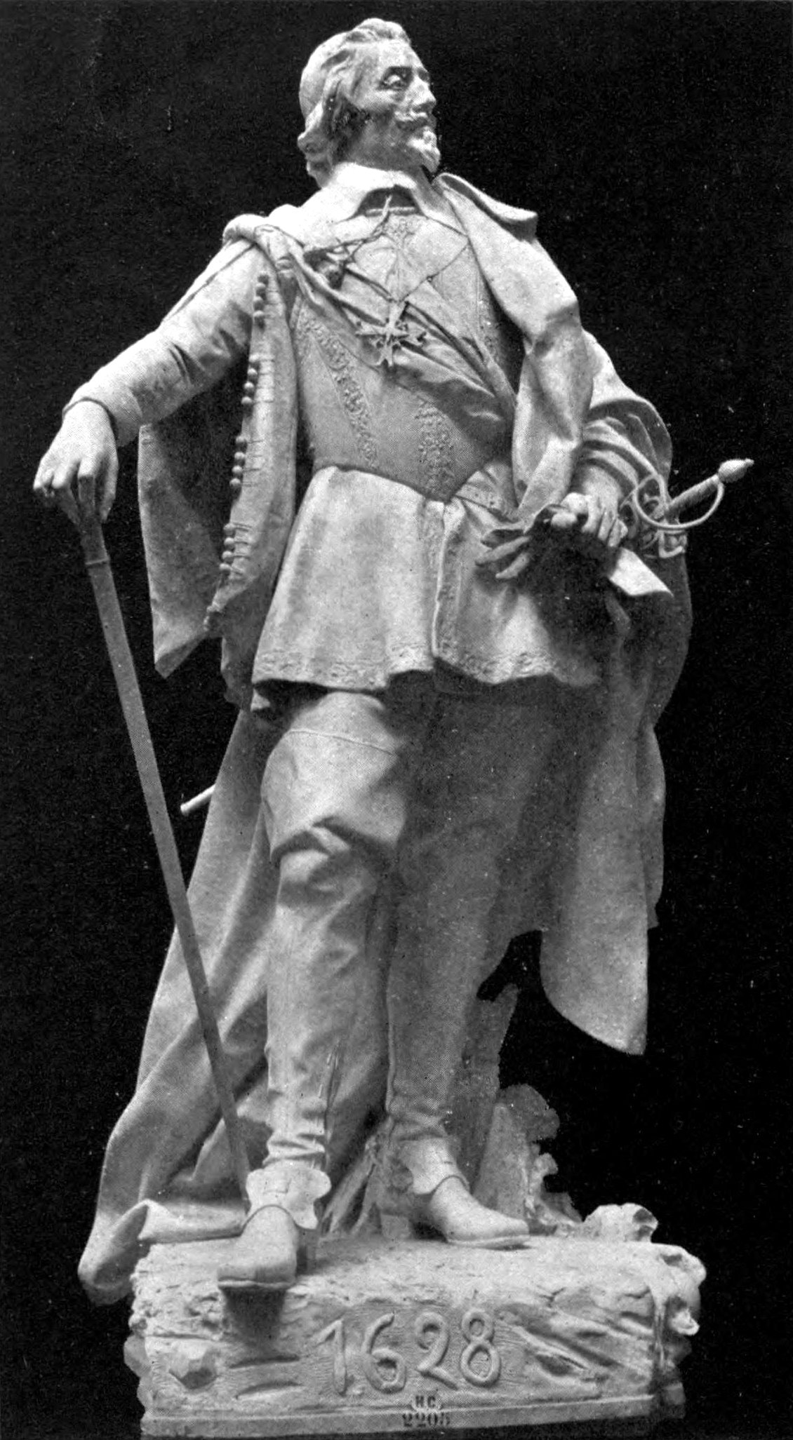 Henri Allouard, Richelieu à La Rochelle, Salon de 1905, appartient à la ville de Paris.